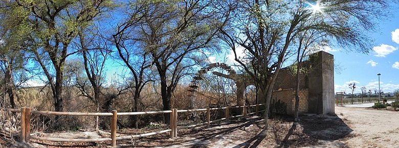 Noria Isla Redonda